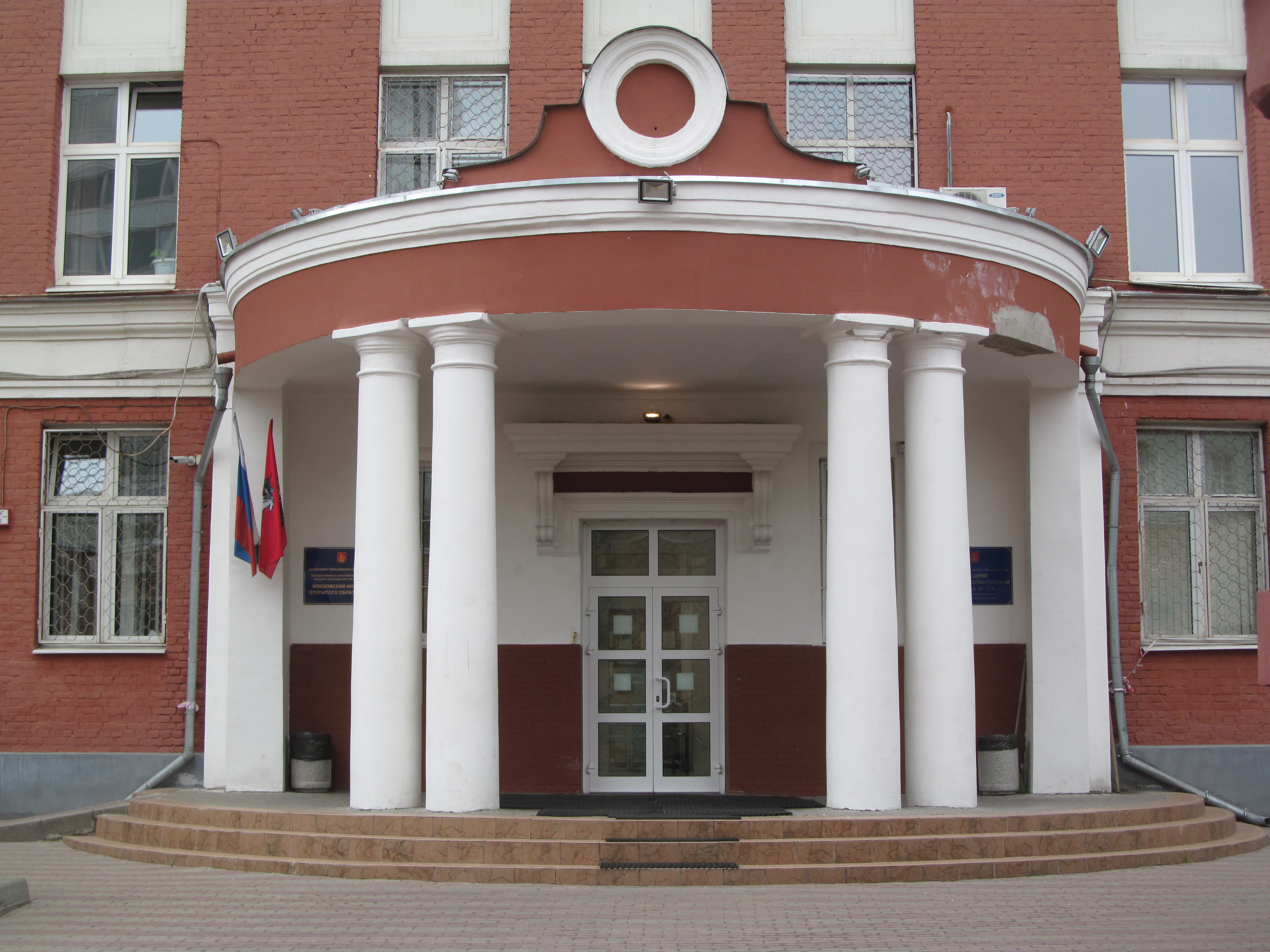 Портик здания школы №179 МИОО, г. Москва, ул. Большая Дмитровка, дом 5/6, строение 7.